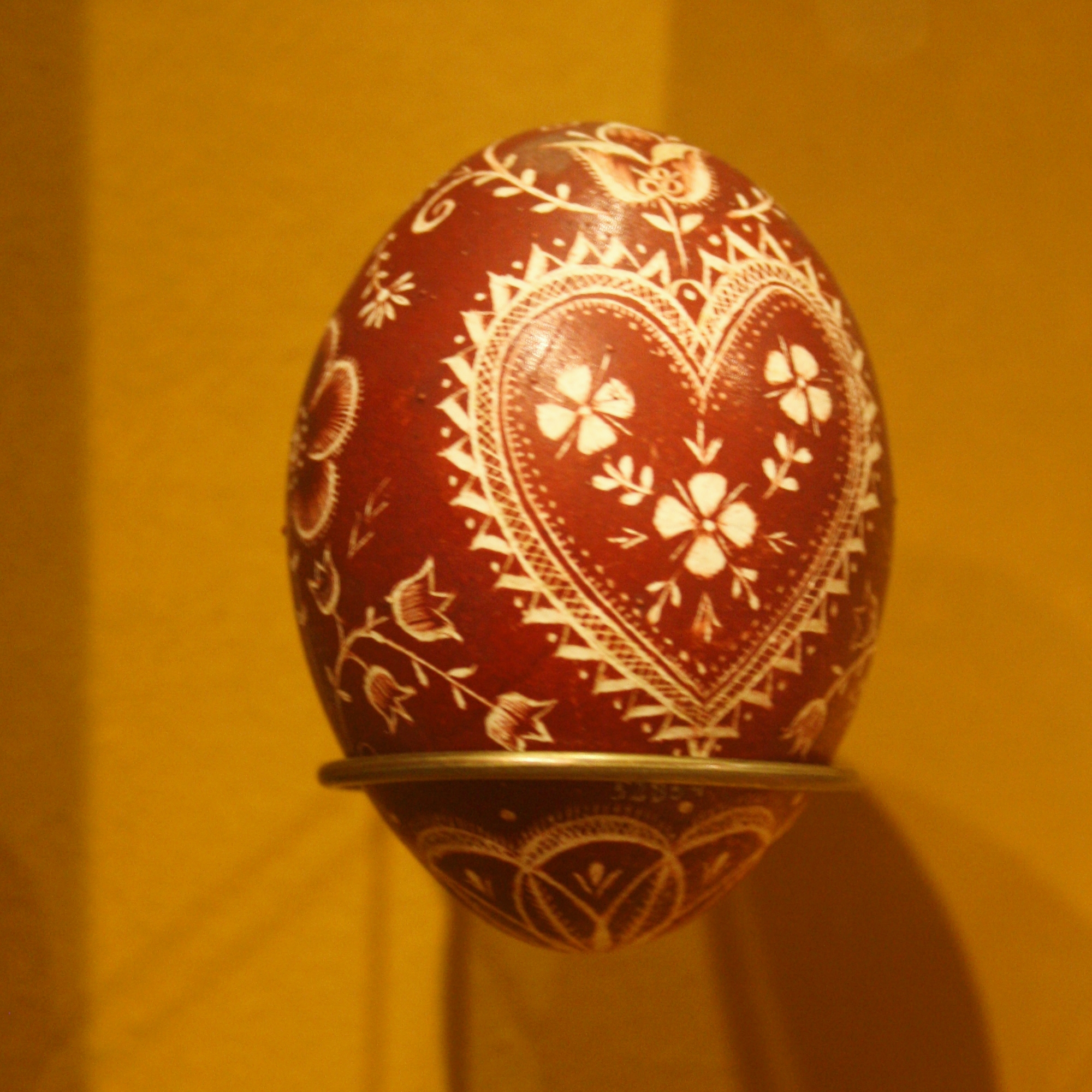 Národopisné muzeum - Musaion: kraslice zdobená vyškrabováním (Čechy, konec 19. století)